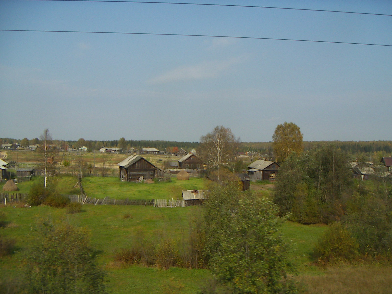 Village in Kostromska Oblast